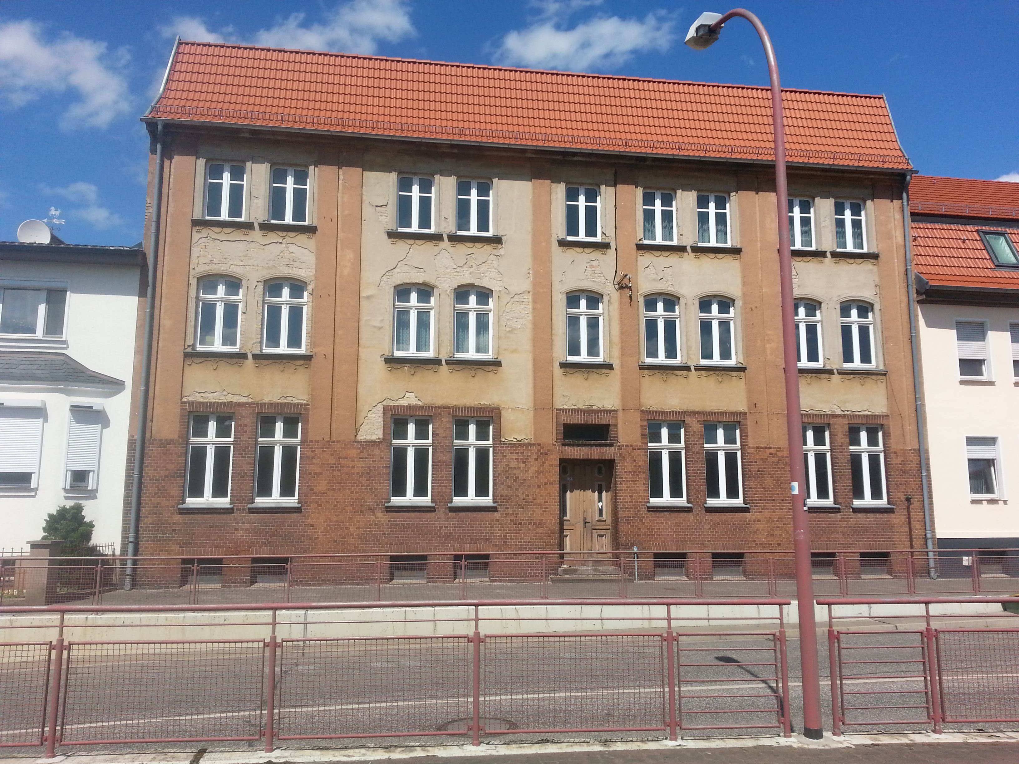 Denkmalgeschütztes Wohnhaus in der Zossener Str. 5 in Trebbin